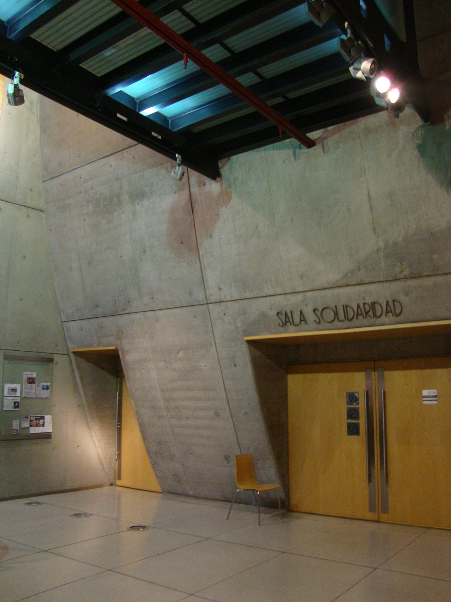 Centro Cultural de Cooperación "Floreal Gorini". Buenos Aires, Argentina.